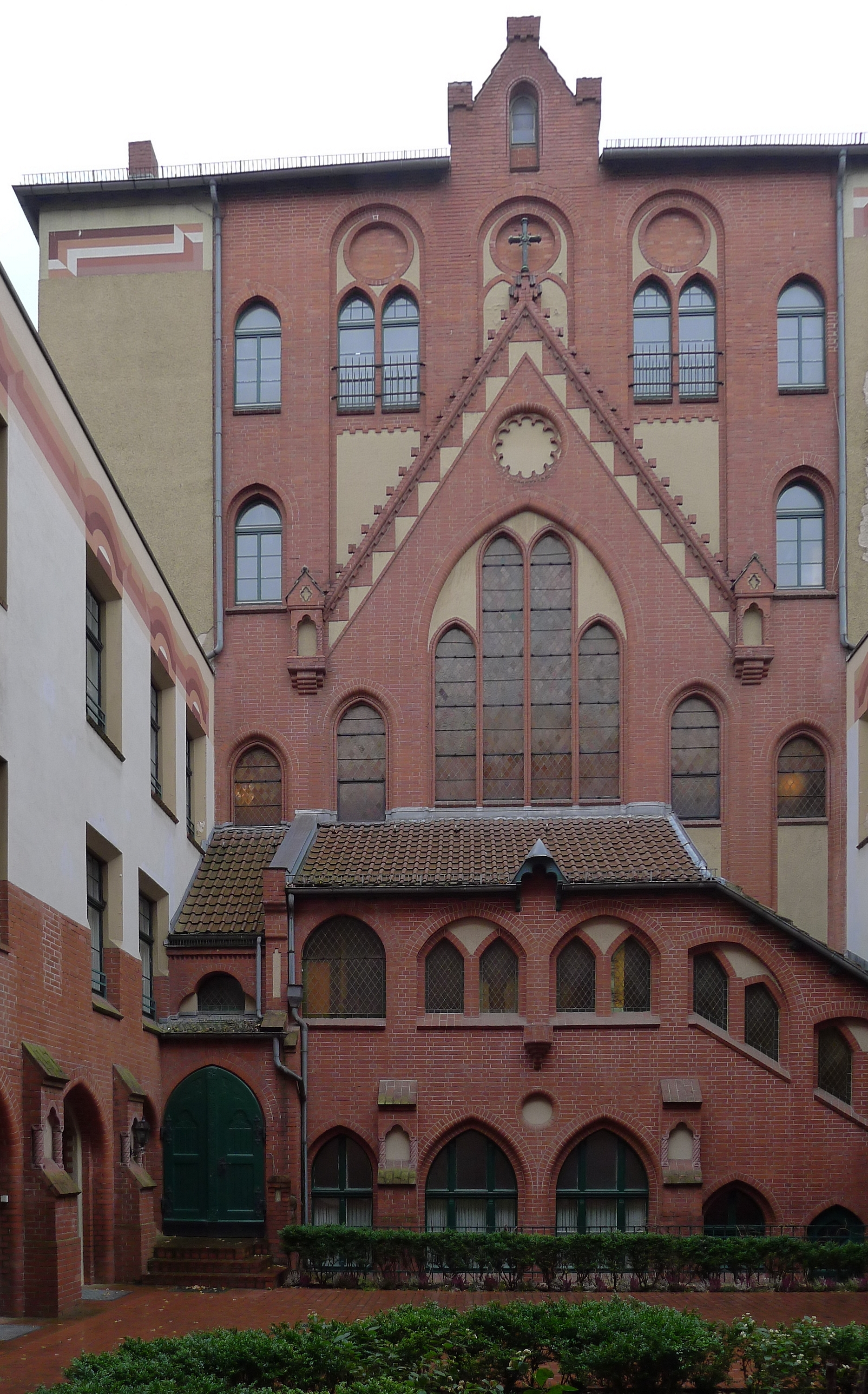 Blick auf die Fassade der Kirche